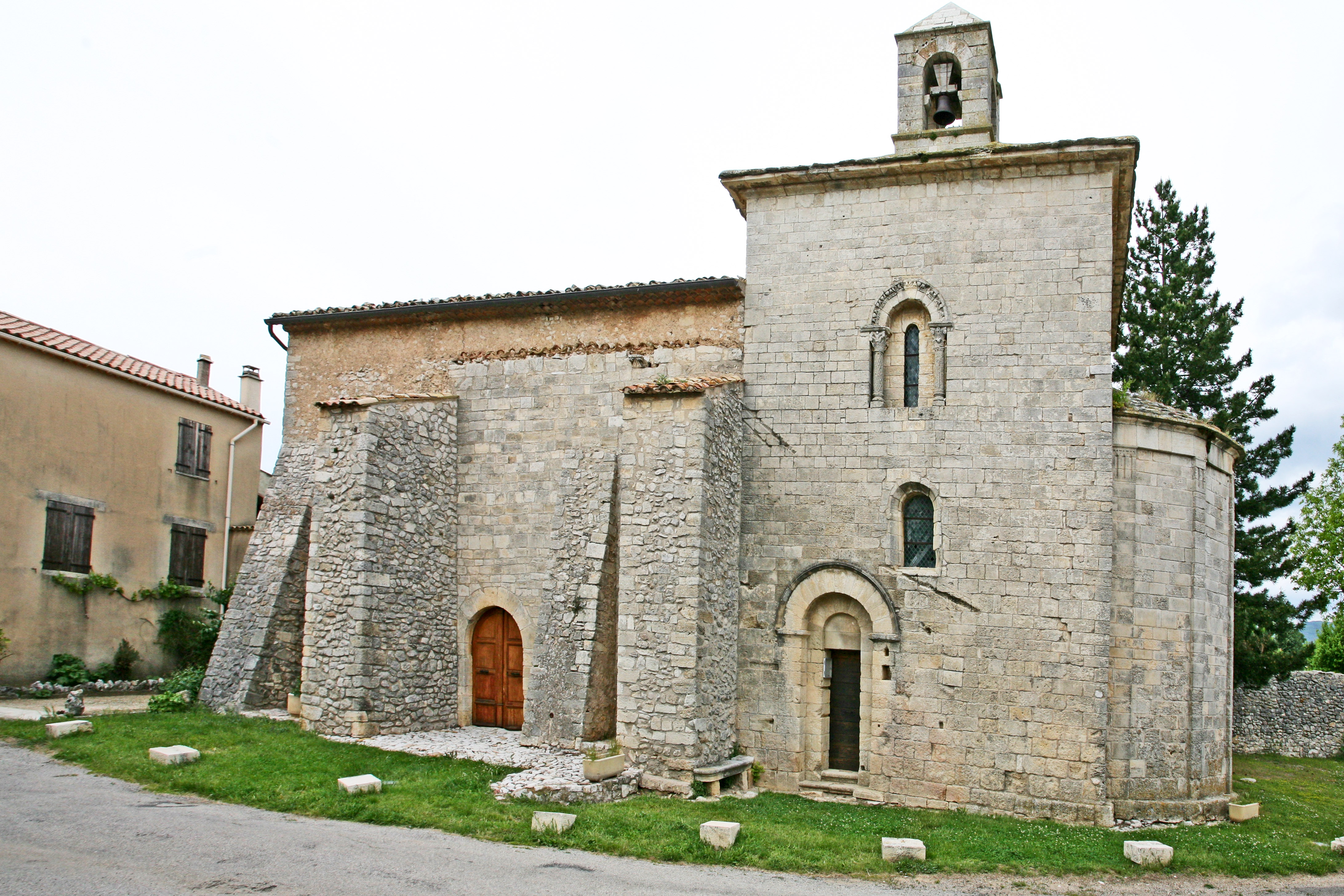 Église de Saint-Trinit (Vaucluse)